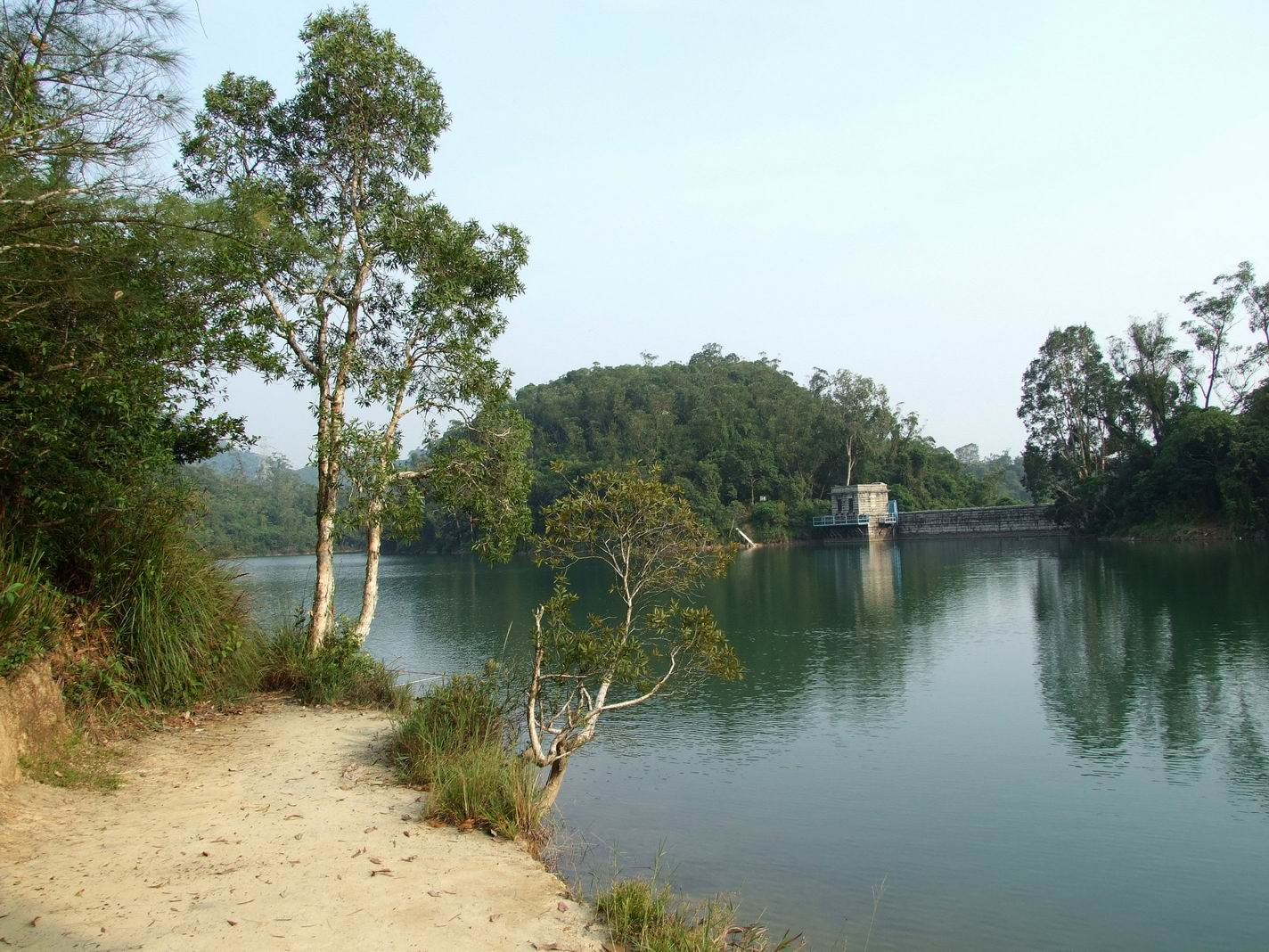 中文（香港）: 九龍接收水塘